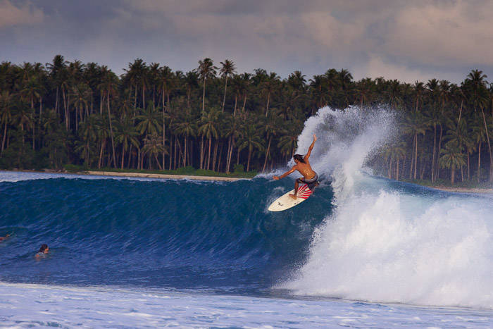 Pulau Tello